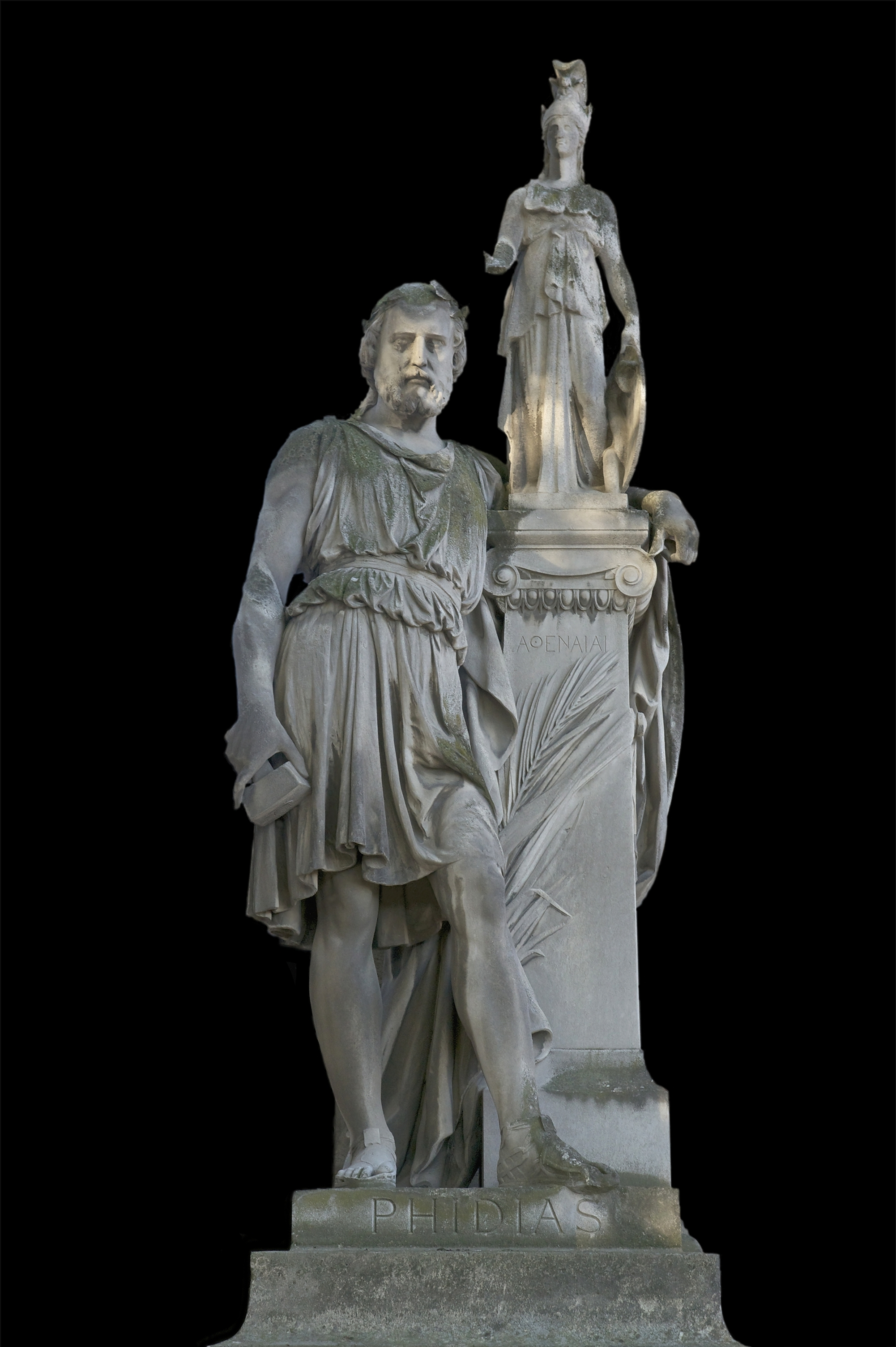 Le sculpteur grec Phidias à côté de son chef d'oeuvre, Athena Parthenos.